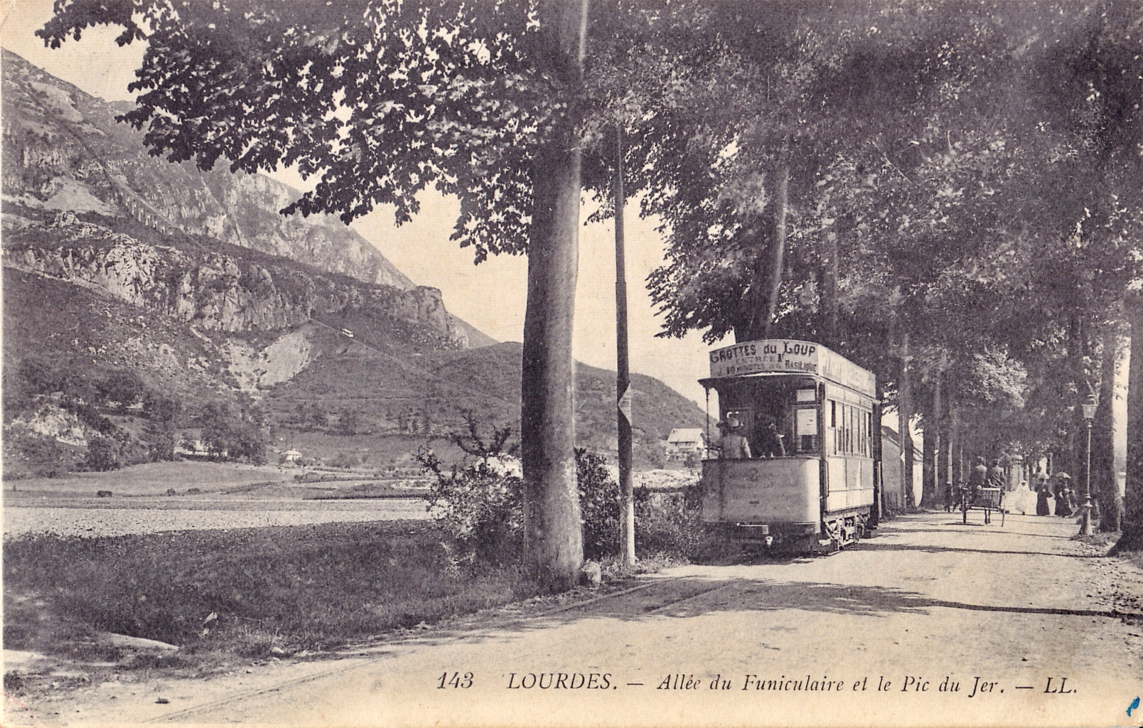 Carte postale ancienne éditée par LL, n°143 : Allée du Funiculaire et le Pic du Jer